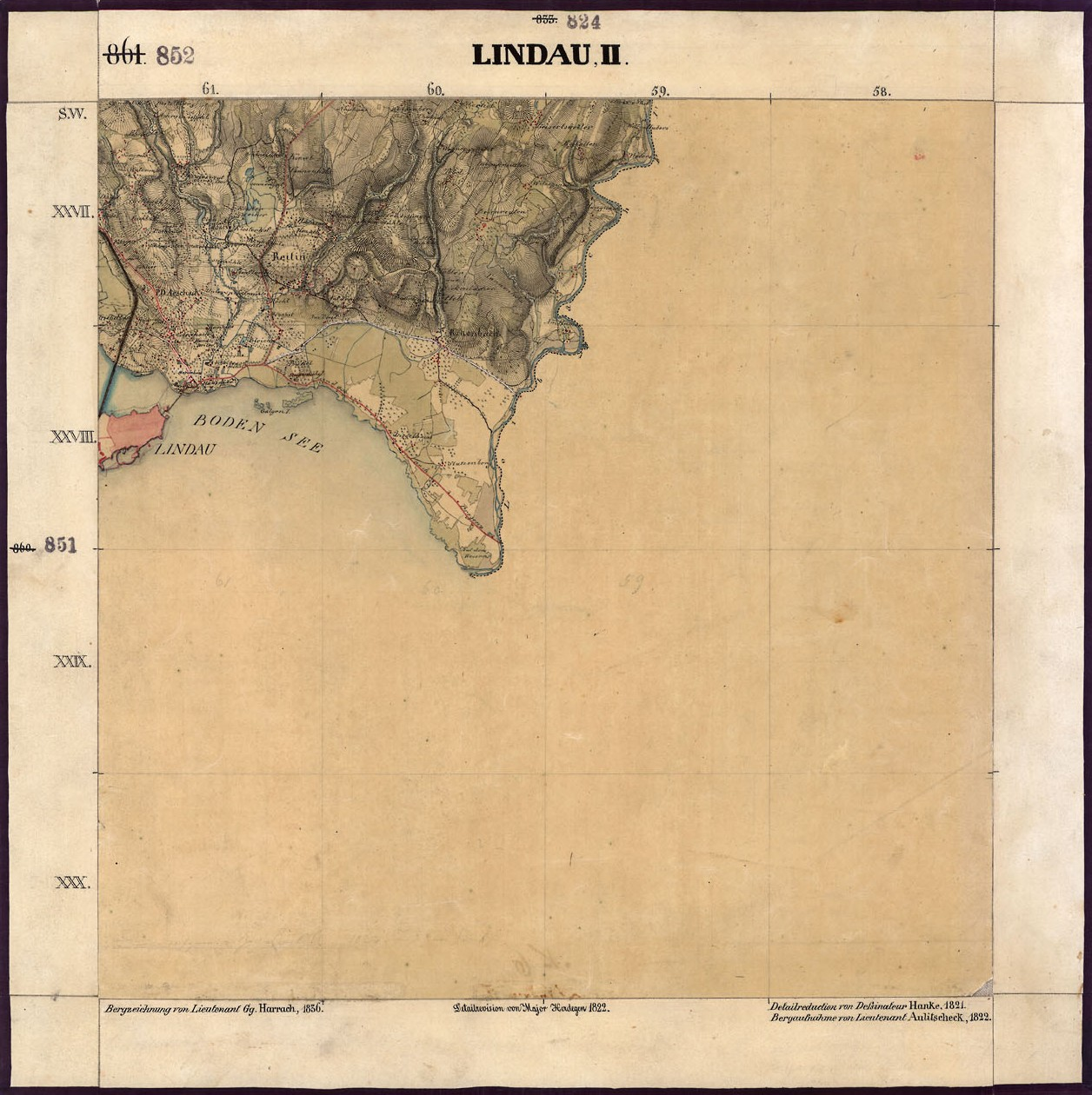 Urpositionsblatt Bayern, ca. 1836